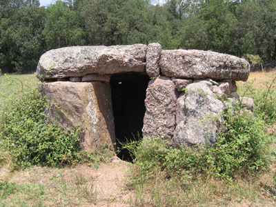 Dolmen de la Mosquera. Peramea, Pallars Sobirà. Any 2006. Peramea, Pallars Sobirà, Catalunya.